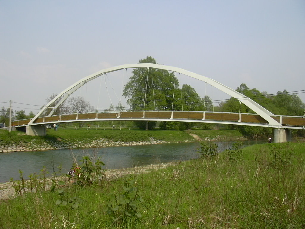 Most přes bečvu u Rybář